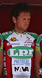 Daniele de Paoli. Team L.P.R.